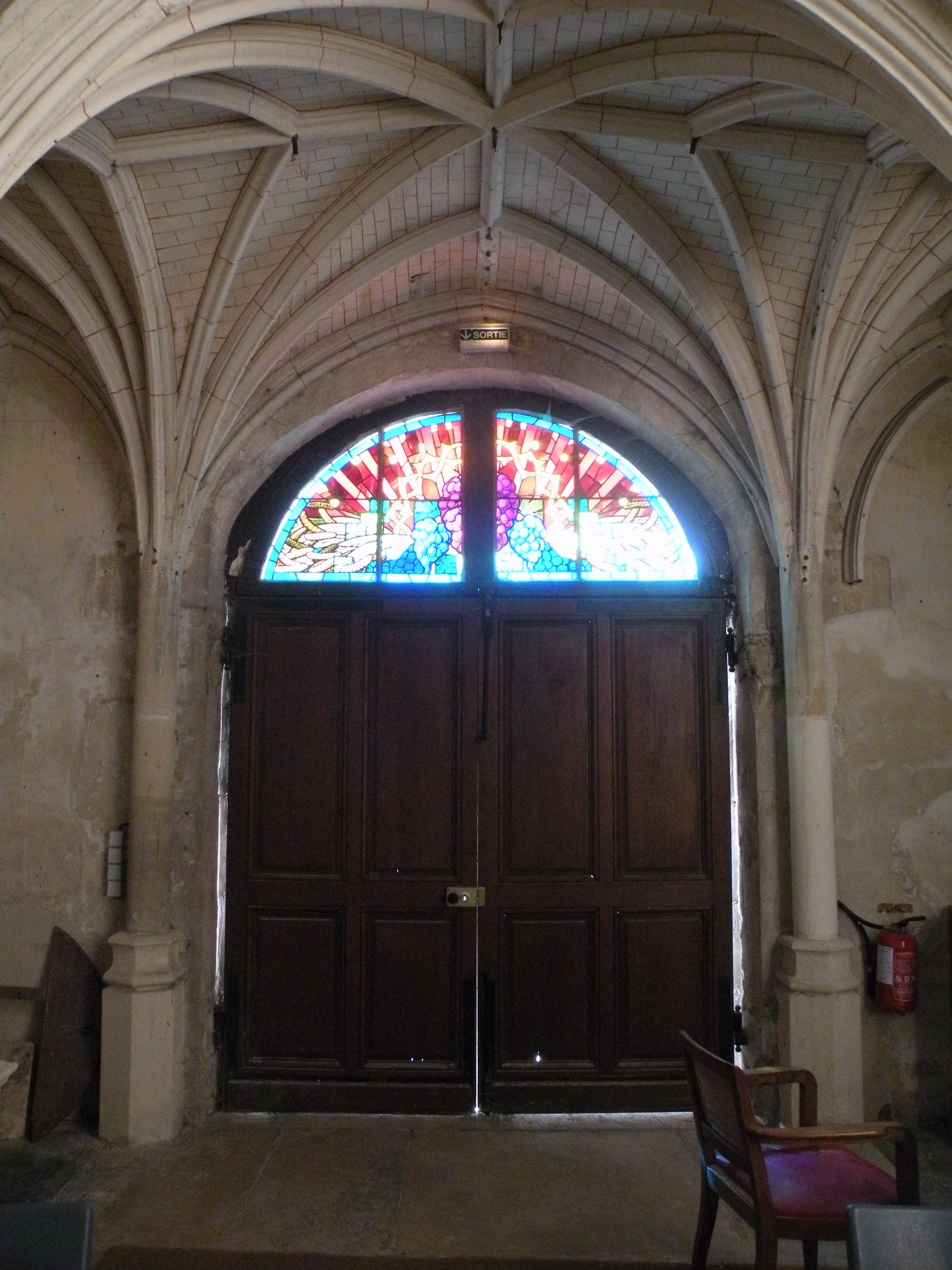 Nef, porte d'entrée.